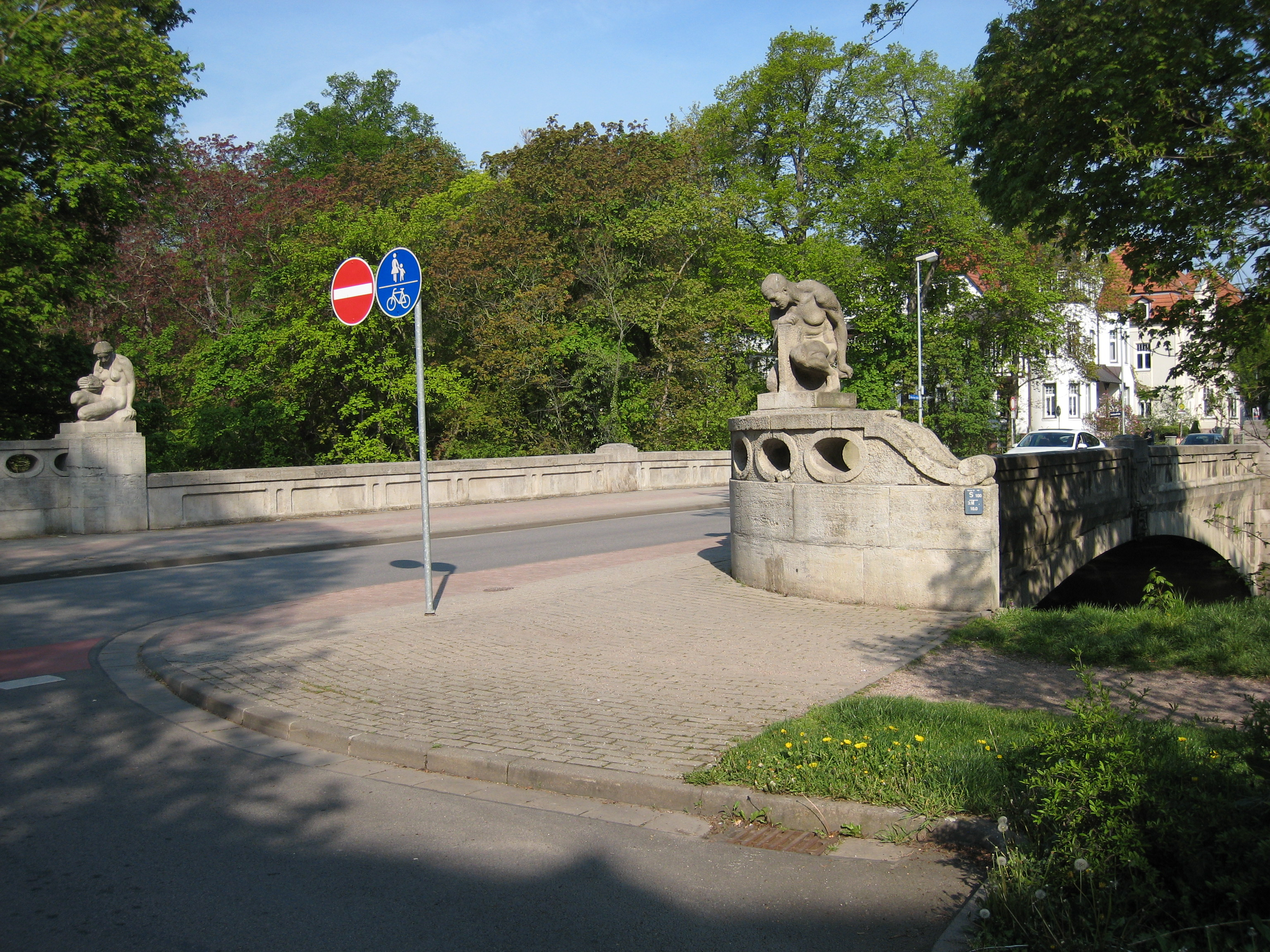 Die Hohenzollern-Brücke in Erfurt (Alfred-Hess-Straße), mit Figuren von Carl Melville.